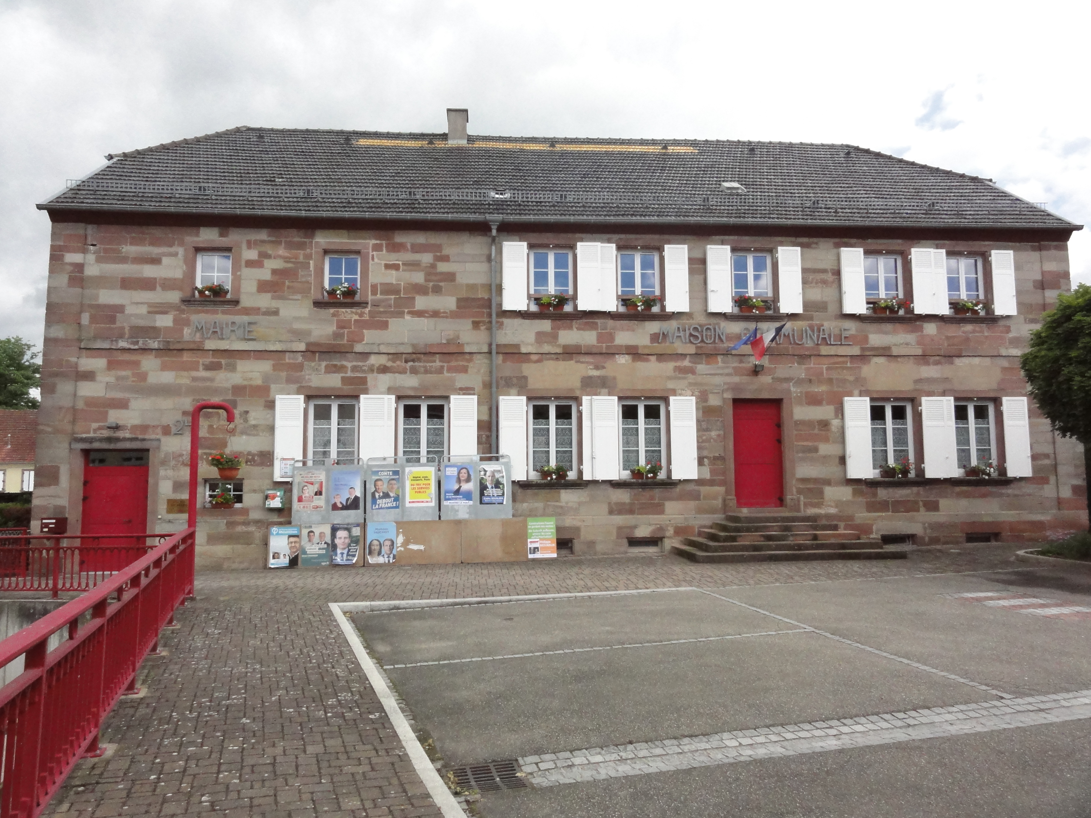 Vilsberg (Moselle) mairie - maison communale